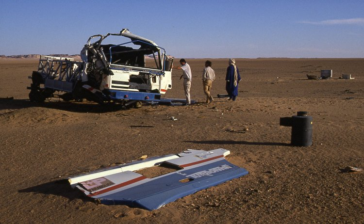 Bildbeschreibung: Rallye Paris - Dakar, Wrack des im Januar 1988 mit Todesfolge (Kees van Loevezijn) verunglückten DAF FAV3600 95X2 TurboTwin in der nördlichen Ténéré-Kieswüste in Norden des Niger Quelle: eigene Aufnahme Bildautor: Holger Reineccius Datum: 24. Oktober 1989